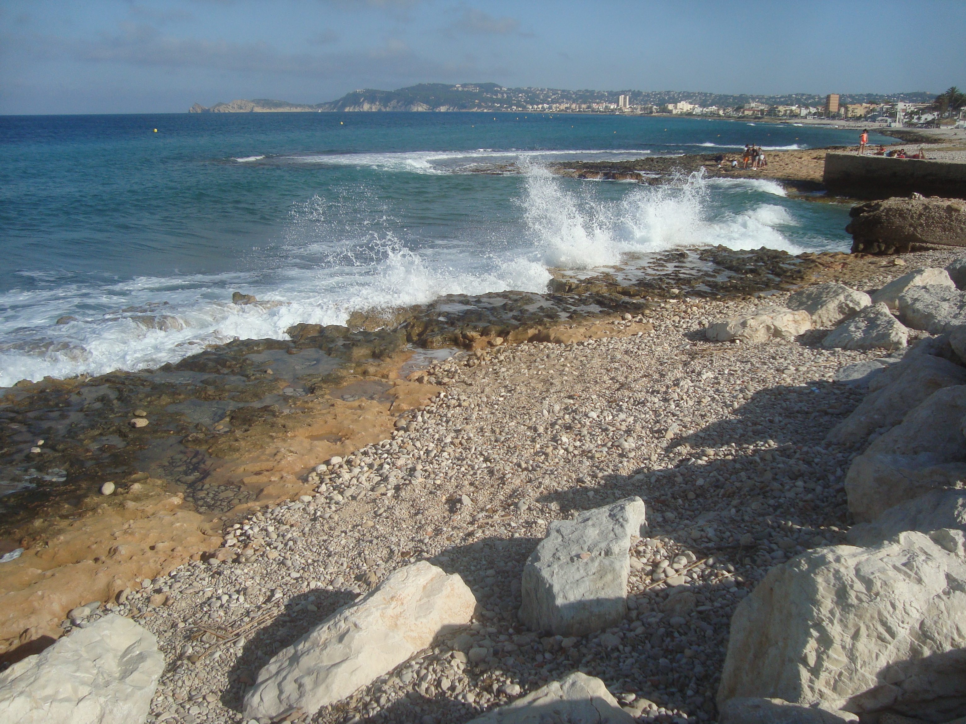 Bahía de Jávea-Xábia.